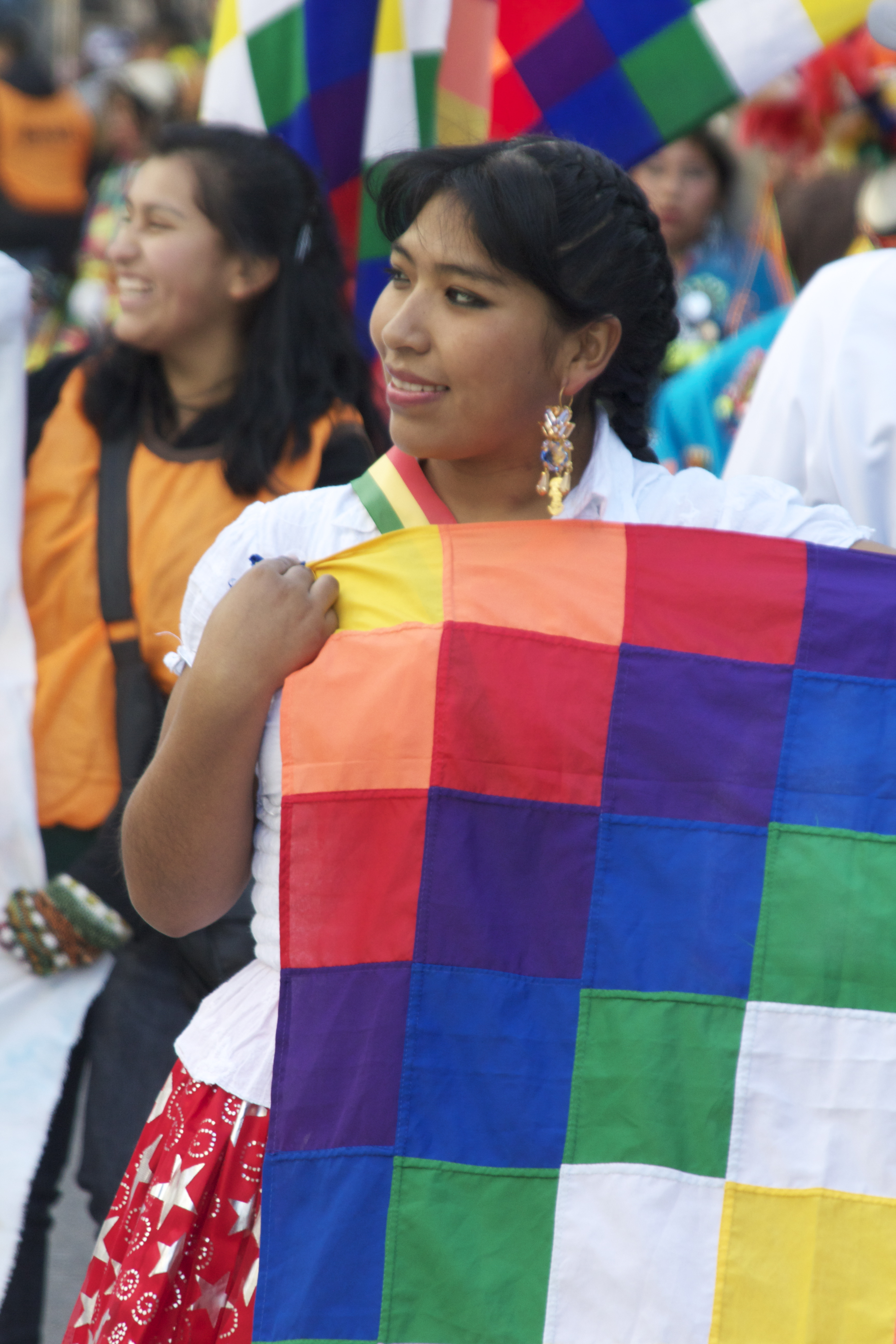 Buenos Aires Celebra Bolivia 2010.